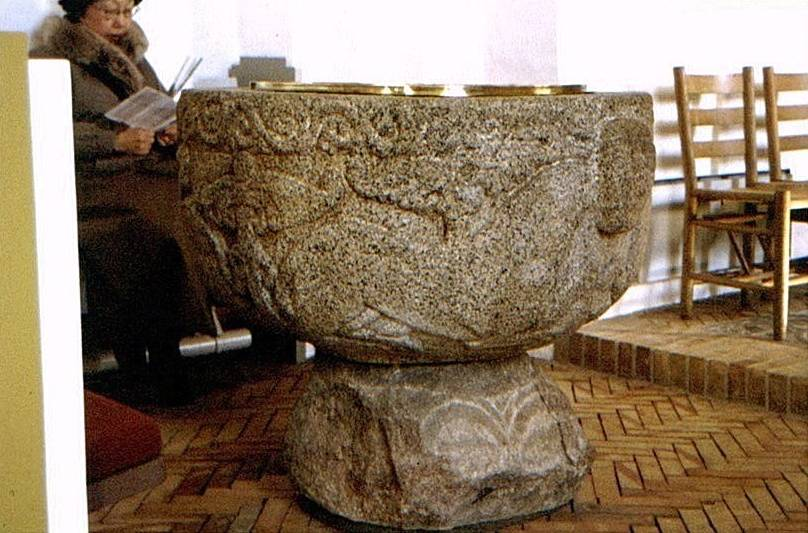 Balle Kirke, Døbefont